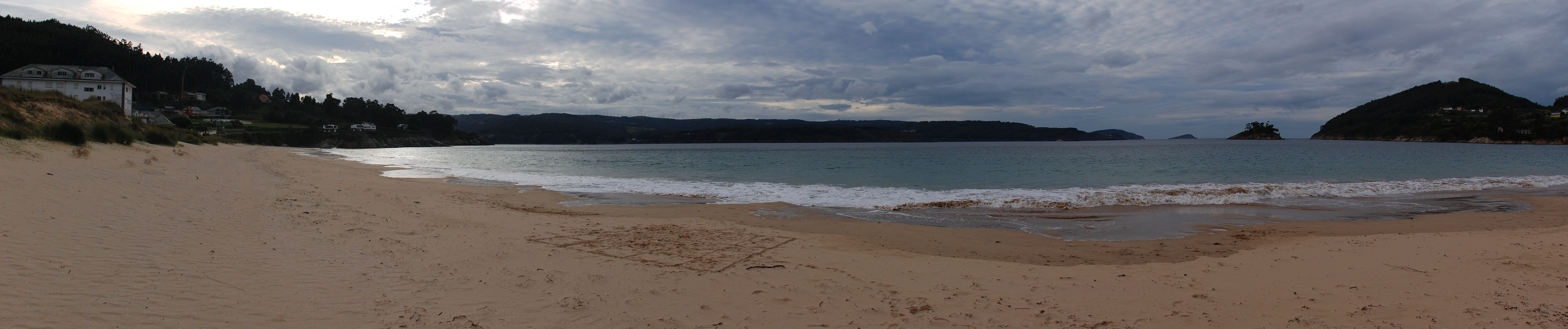 Praia de Area na ría de Viveiro, pertencente ó Lugar de Importancia Comunitaria Costa da Mariña Occidental. This is a photography of a Special Area of Conservation in Spain with the ID: ES1120017. Natura2000 entry, EEA entry